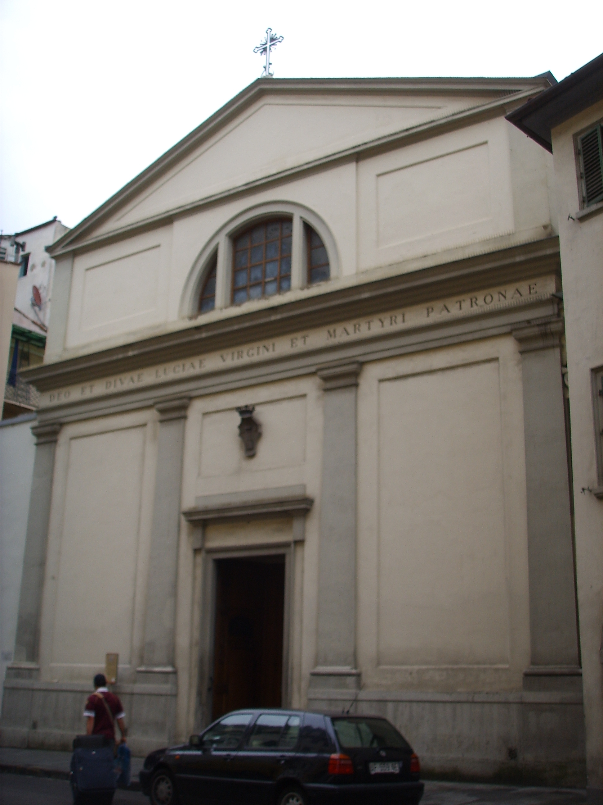 Santa Lucia sul Prato church, inside, Florence, Italy